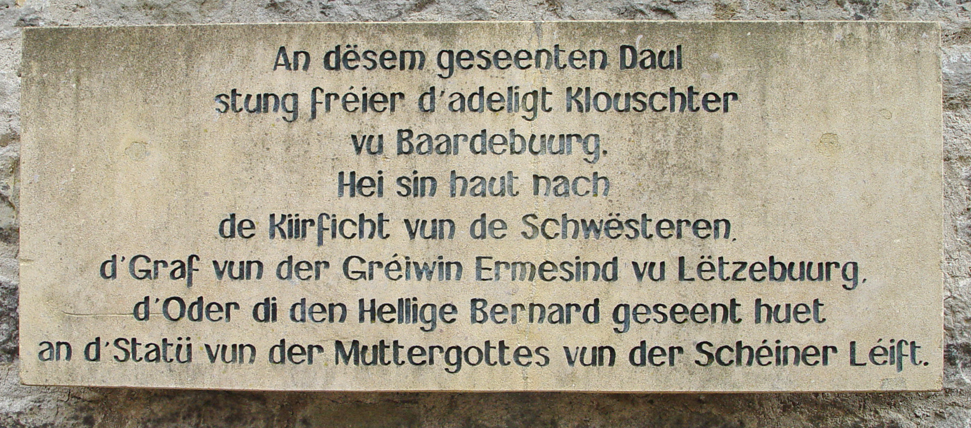 Clairefontaine Steen un der Mauer virun der Marie-Kapell: An dësem geseenten Daul stung fréier d'adeligt Klouschter vu Baardebuurg. Hei sin haut nach de Kiirficht vun de Schwësteren, d'Graf vun der Gréiwin Ermesind vu Lëtzebuurg, d'Oder di den Hellige Bernard geseent huet an d'Statü vun der Muttergottes vun der Schéiner Léift.